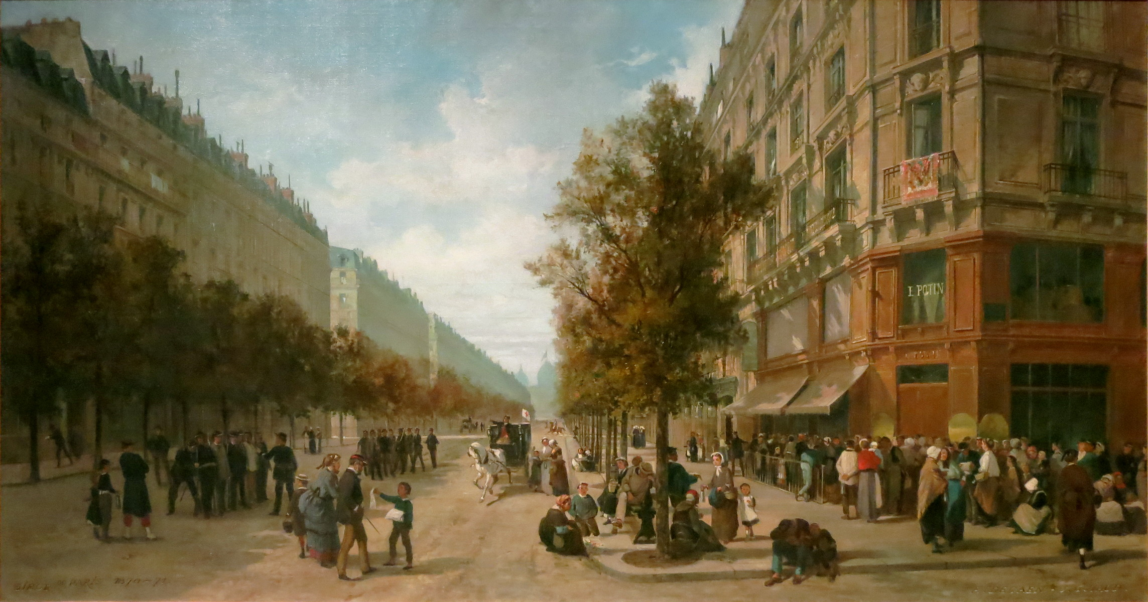 La queue à la porte d'une épicerie Félix Potin, à l'angle de la rue Réaumur et du boulevard de Sébastopol à Paris, en novembre 1870.title QS:P1476,fr:"La queue à la porte d'une épicerie Félix Potin, à l'angle de la rue Réaumur et du boulevard de Sébastopol à Paris, en novembre 1870." label QS:Lfr,"La queue à la porte d'une épicerie Félix Potin, à l'angle de la rue Réaumur et du boulevard de Sébastopol à Paris, en novembre 1870."